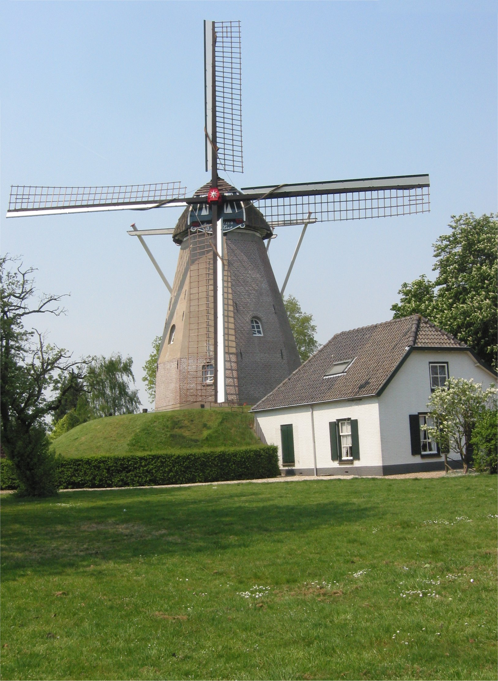 De Keetmolen in Ede, Nederland